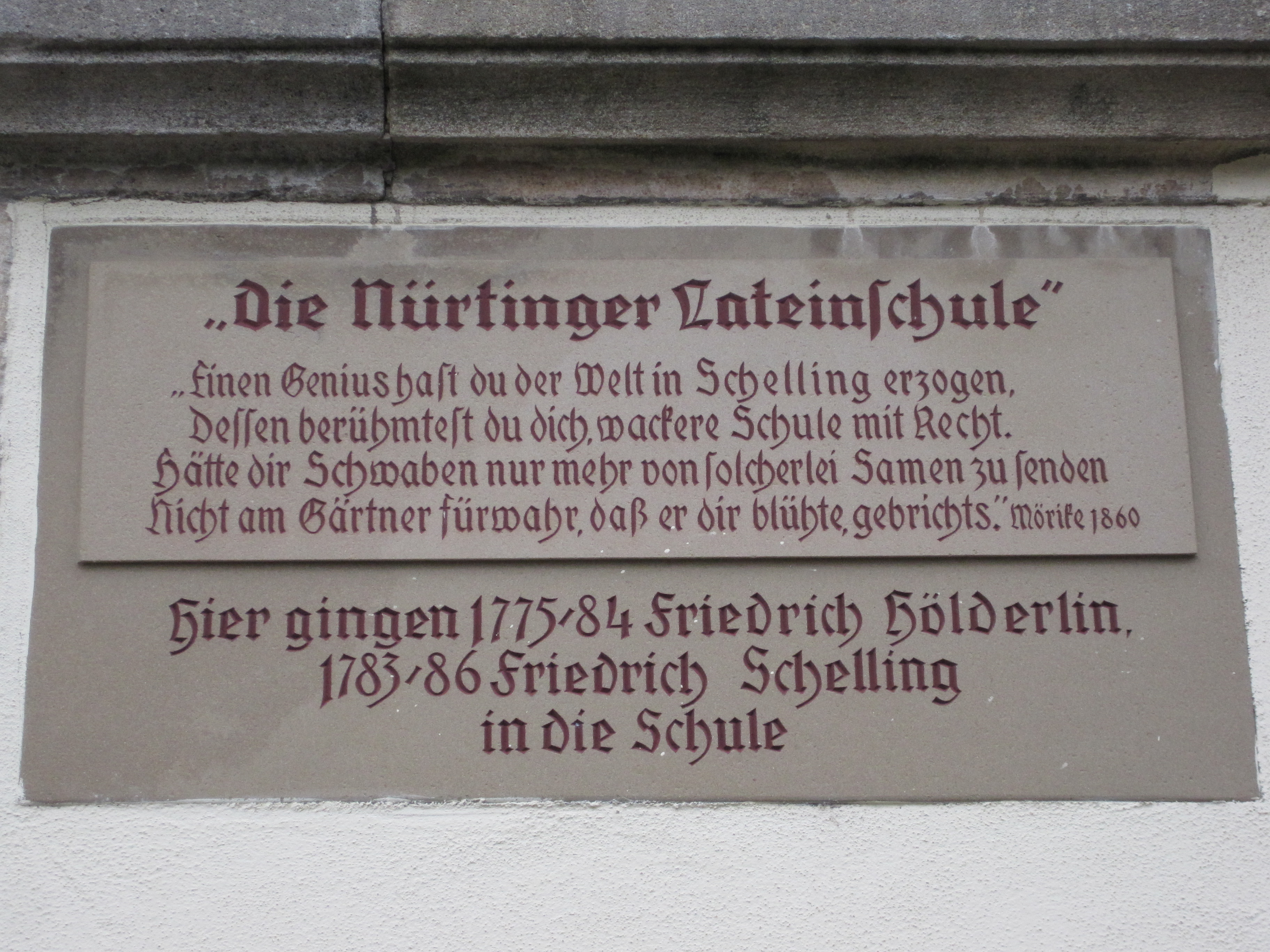 Inschrifttafel am Gebäude der ehemaligen Nürtinger Lateinschule. Mit einem Zitat von Eduard Mörike: „Einen Genius hast du der Welt in Schelling erzogen, dessen berühmtest du dich, wackere Schule mit Recht. Hätte dir Schwaben nur mehr von solcherlei Samen zu senden Nicht am Gärtner fürwahr, daß er dir blühte, gebrichts.“ Hier gingen 1775-84 Friedrich Hölderlin, 1783-86 Friedrich Schelling in die Schule